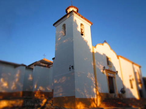 Ermita de la Virgen del Rosario. (Imagen cedida por M. Martínez)